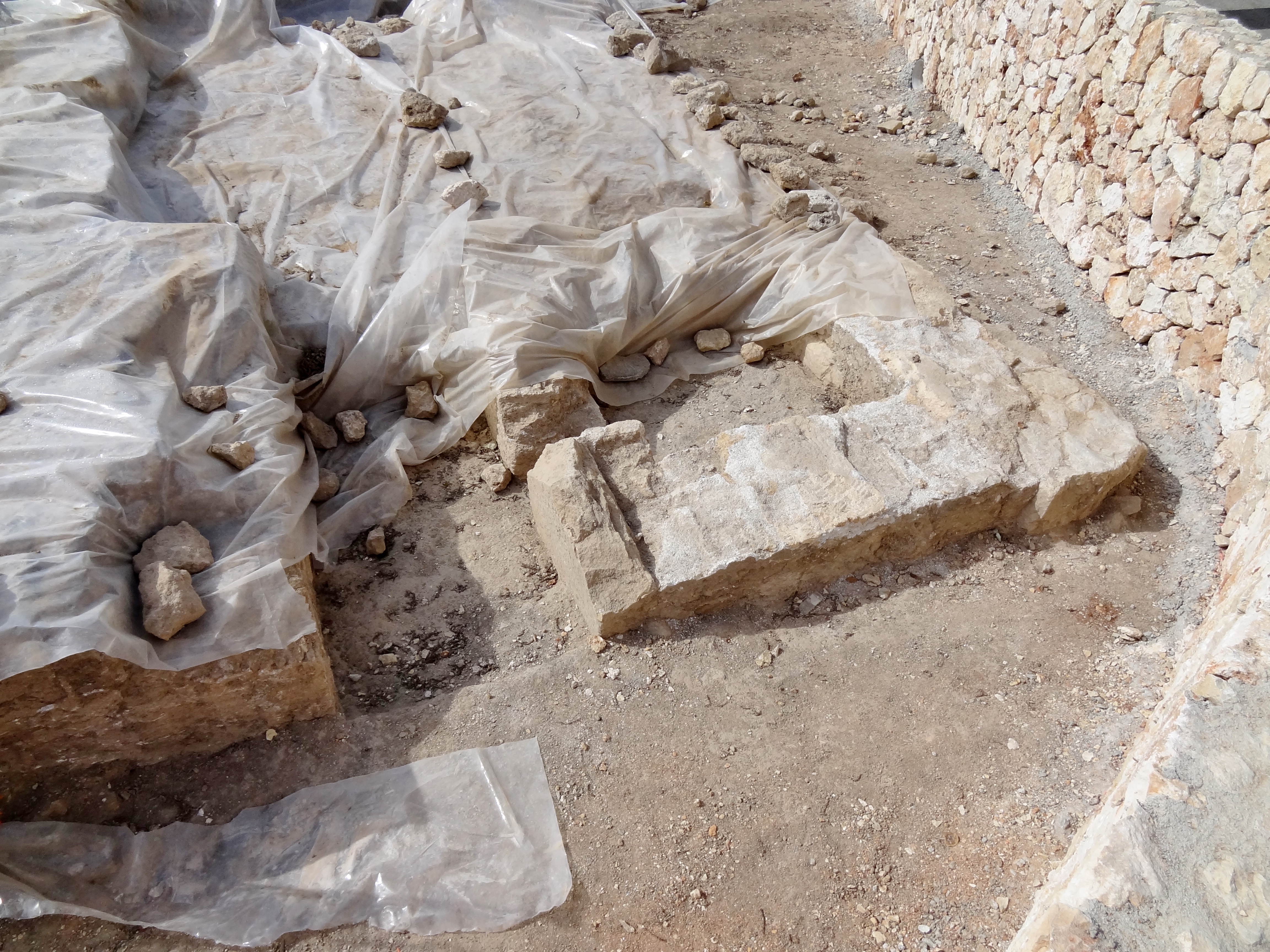 Ausgrabungsstätte an der Landstraße MA-4034 am Landgut Son Sard in der Gemeinde Son Servera, Mallorca, Spanien